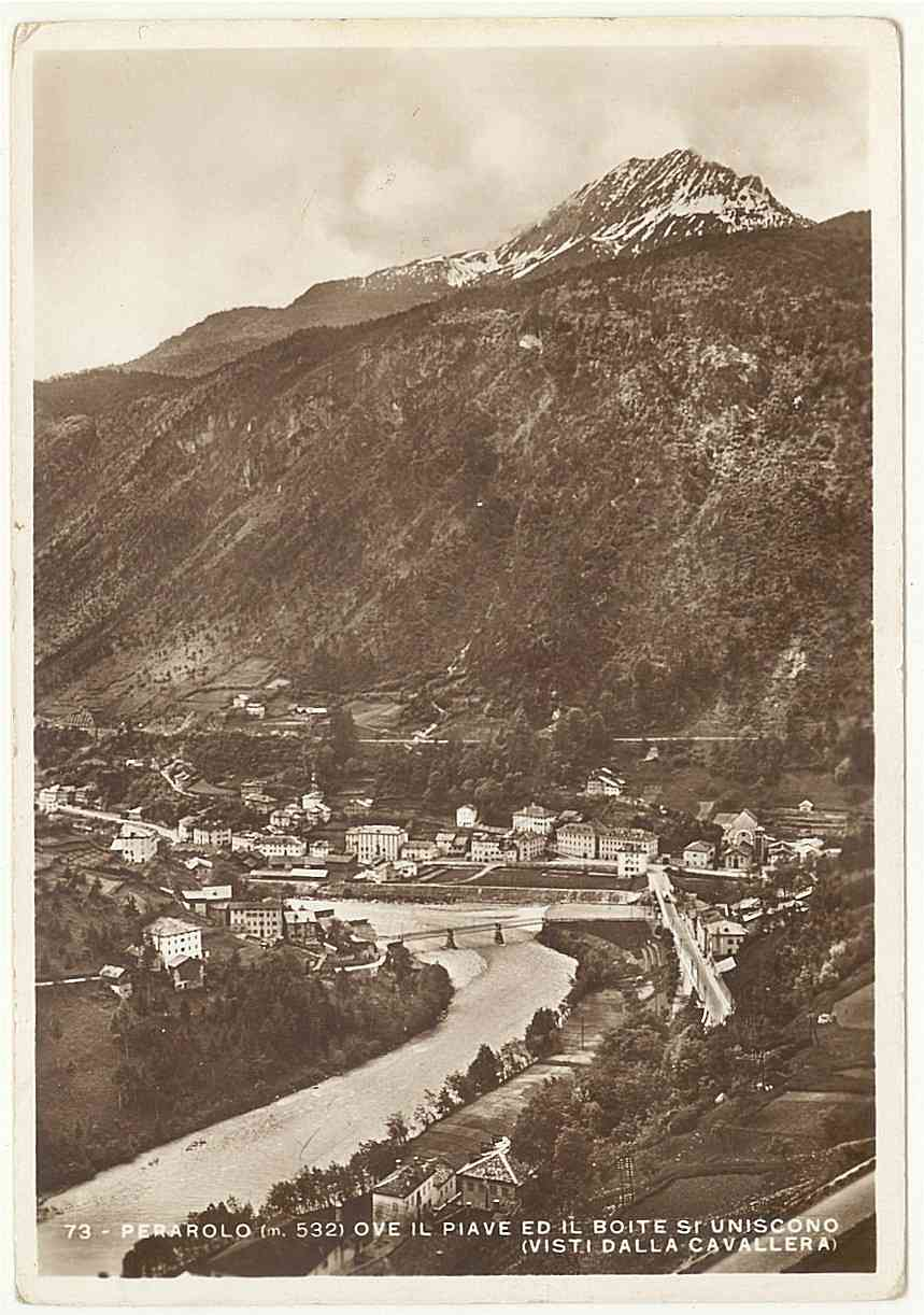 BL Perarolo m.532 ove il Piave e il Boite si uniscono (visti dalla Cavallera)